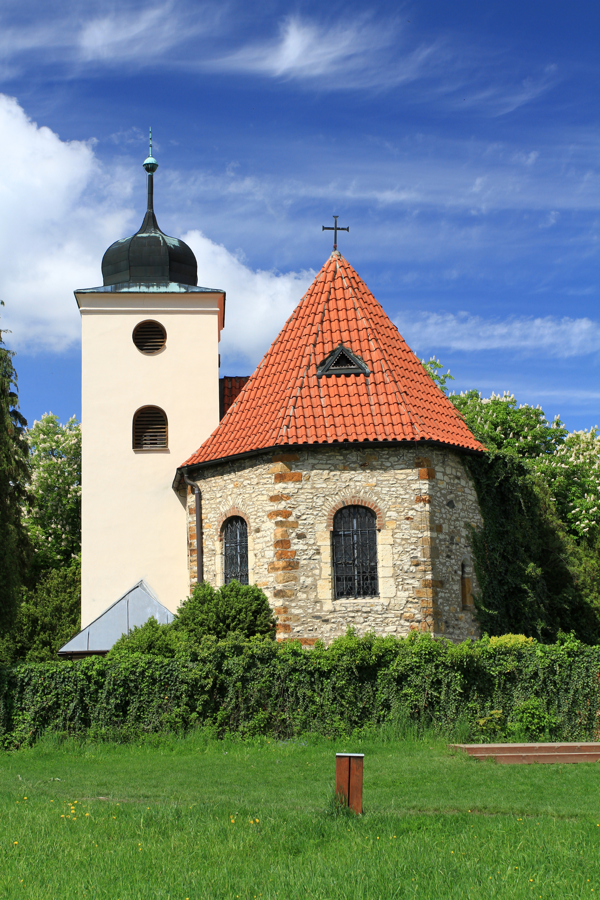 Hradiště Levý Hradec, Roztoky